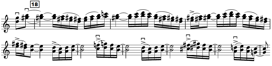 Thème en mi majeur du Boléro de Ravel